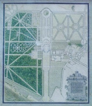 Plan du château de Magnanville construit par l'architecte François II Franque à Magnanville (Yvelines, France). Plan réalisé à la demande de Tavernier de Boullogne de Préninville, acquéreur du domaine en janvier 1767.